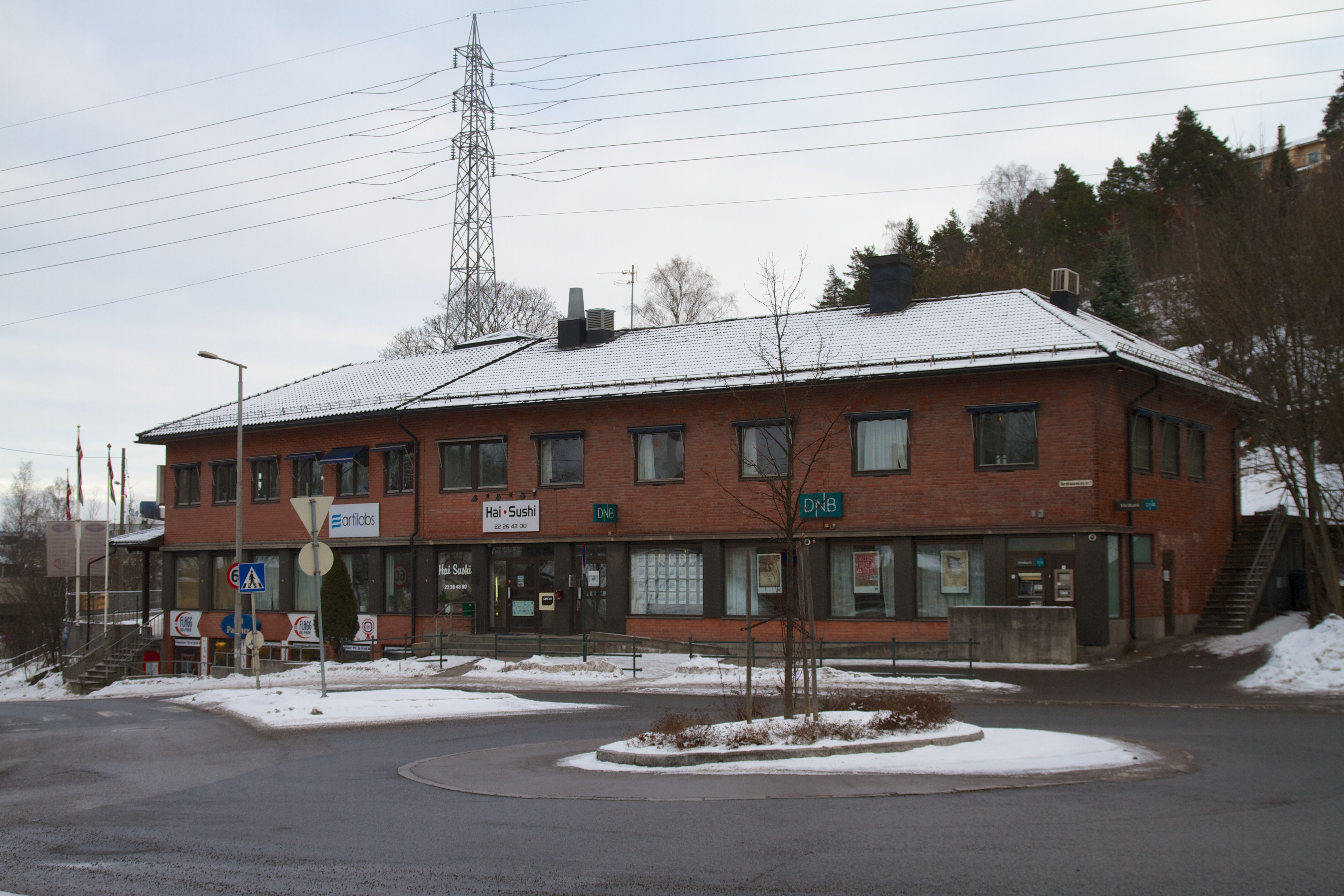 Jernbaneveien 1-5. Bryn i Oslo.